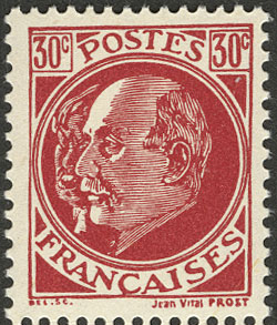 Britische Propagandafälschung für Frankreich (Vichy-Regime). Neben dem prodeutschen Ministerpräsidenten Laval befindet sich ein "dämonisch" blickender Staatschef Petain.